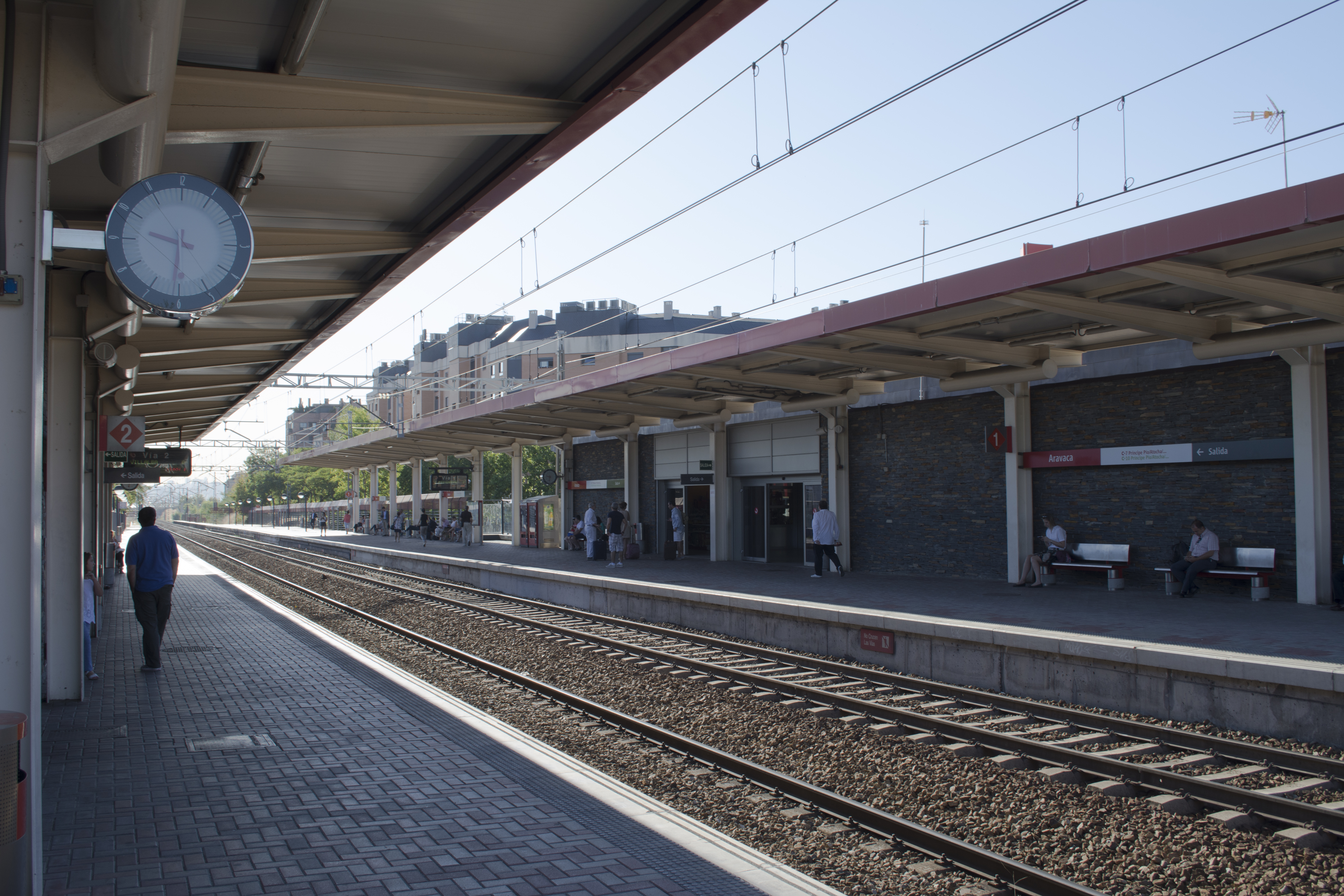 Andenes de la estación de Aravaca (Marid).